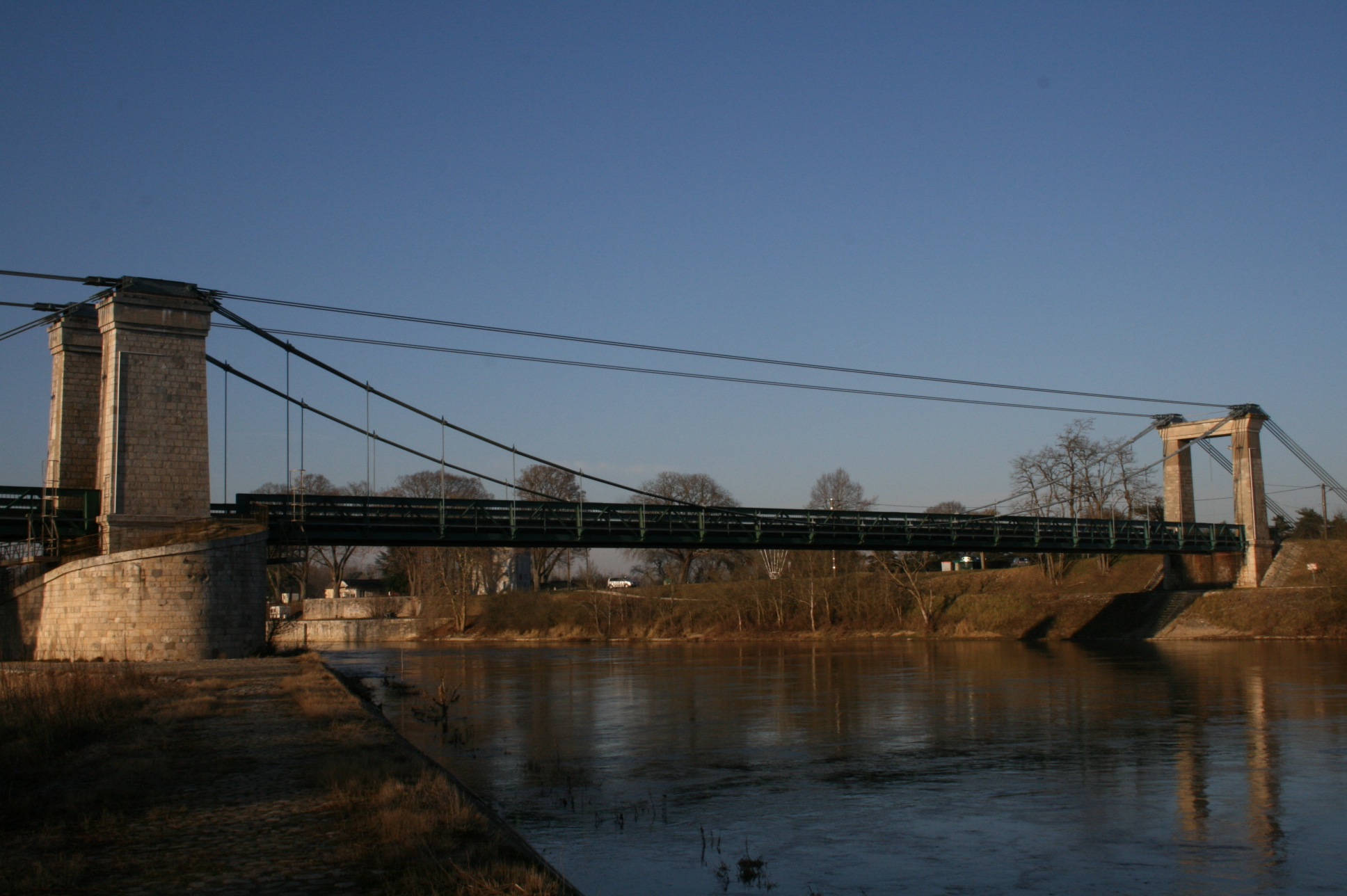 Pont de Châtillon-sur-Loire (Loiret - France) - Pont suspendu franchissant la Loire - Travée la térale droite vue à partir de l'épi en Loire.